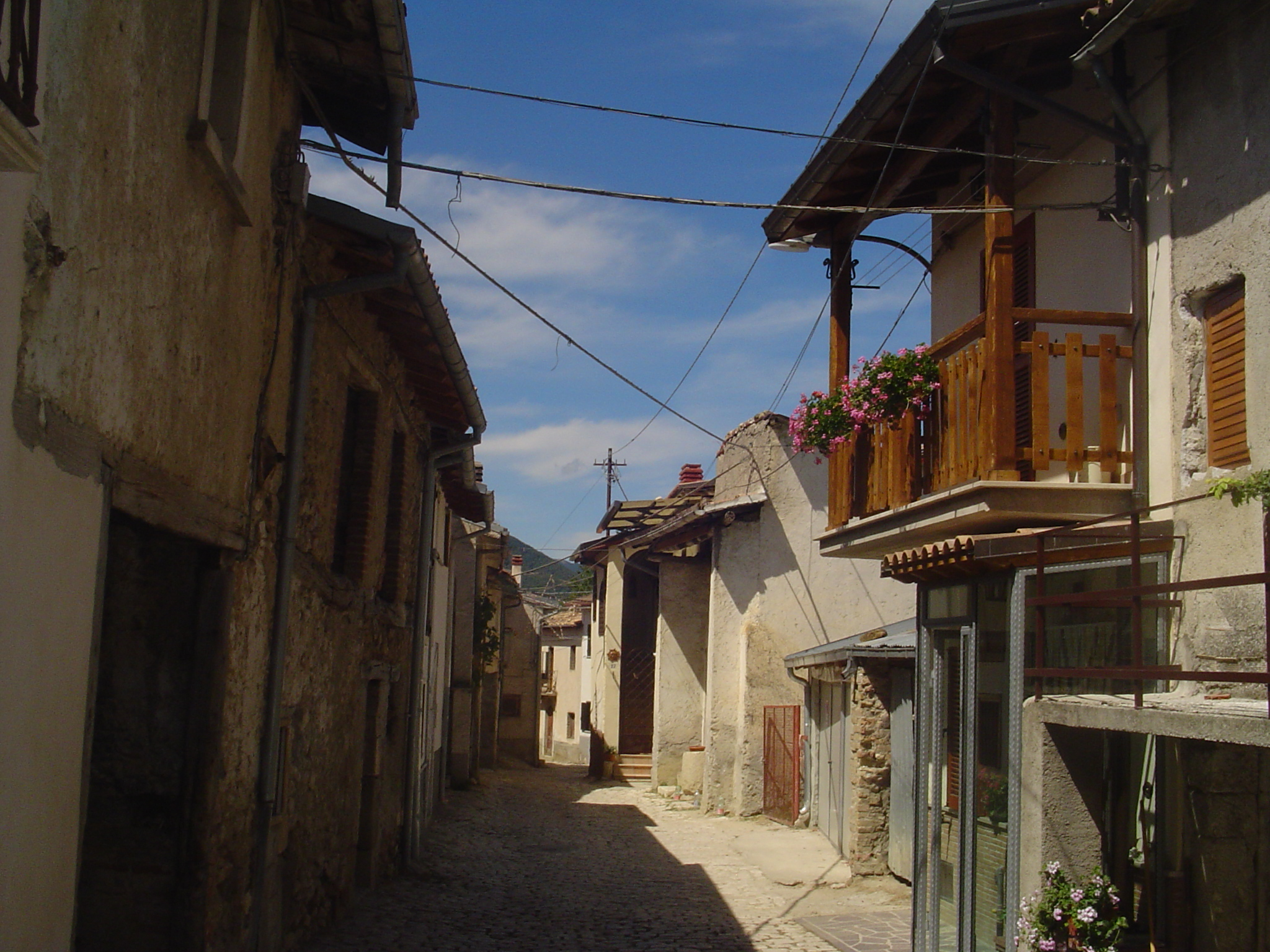 Frazioni dell'Aquila: Collemare di Sassa